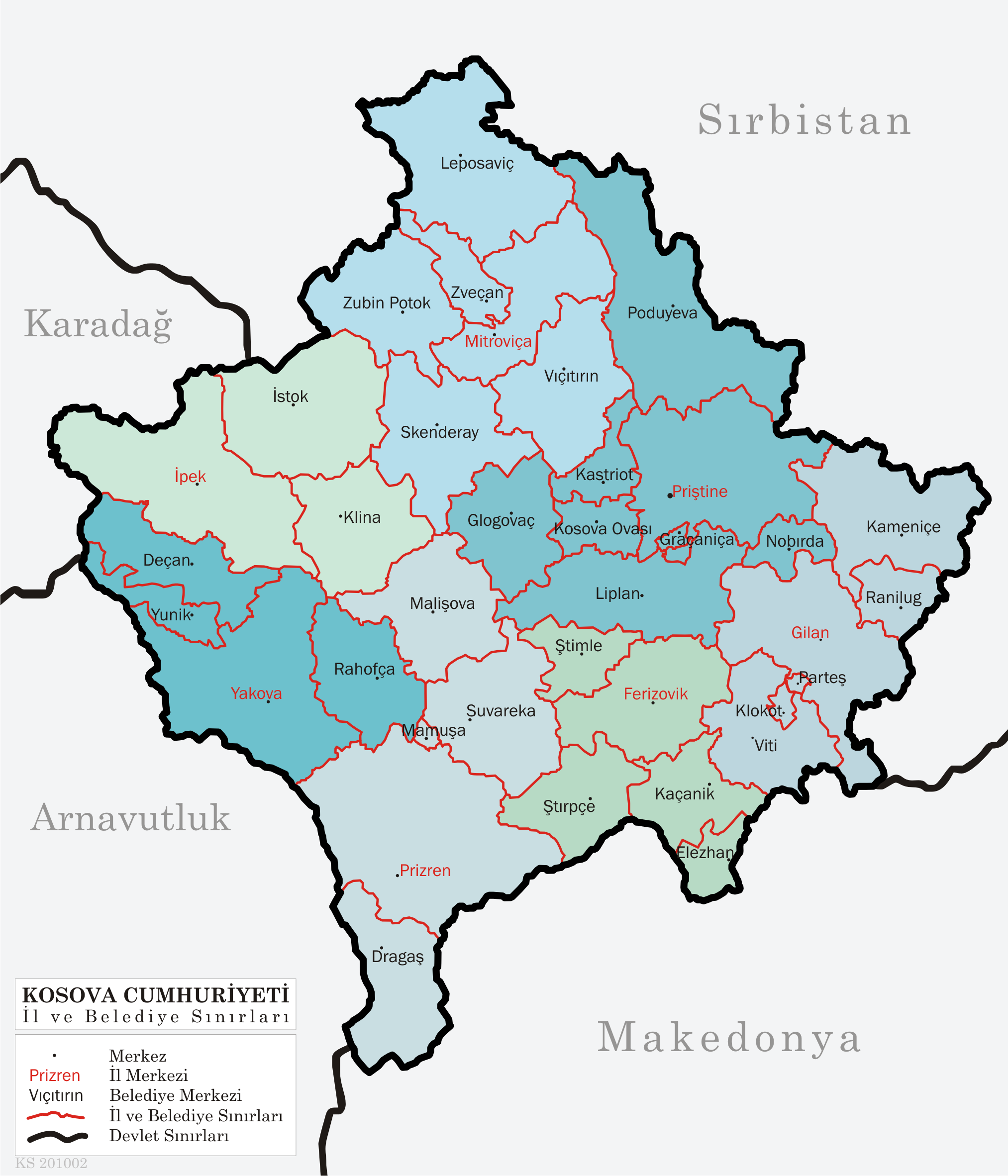 Kosova idari haritası